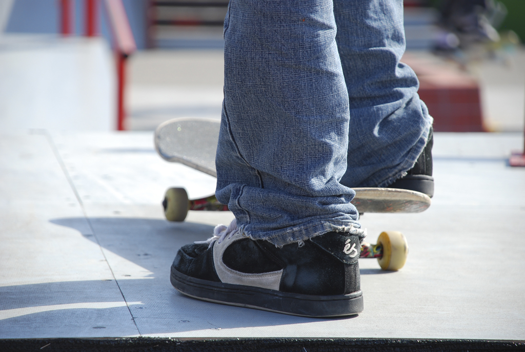 Skateboarder, Festival della Creatività 2009, Florence, Italy.